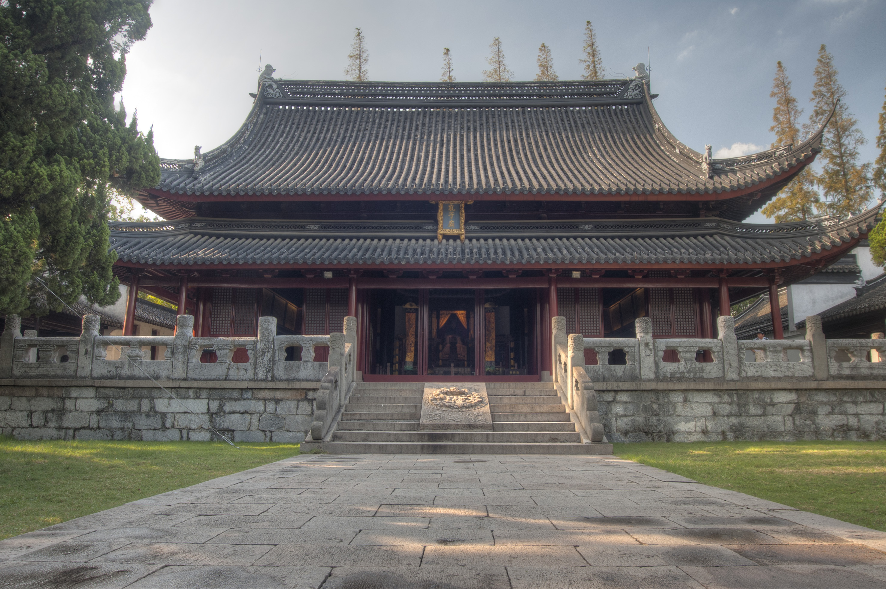 中文（中国大陆）: 20130918-嘉定孔庙-2